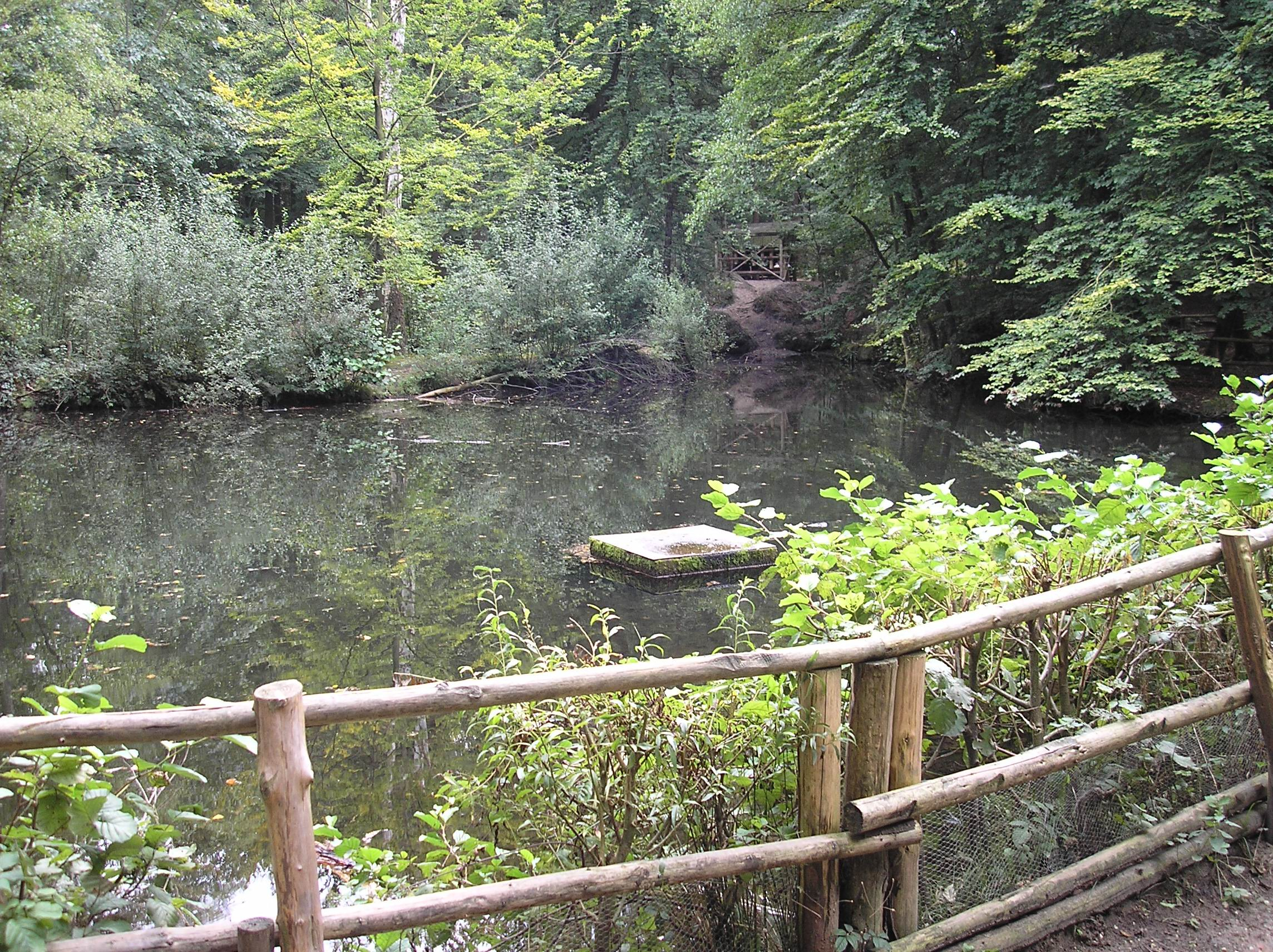 Quellteich der „Sieben Quellen“ im Rand des Reichswalds bei Kranenburg-Nütterden (Erholungsgebiet am Forsthaus Nütterden, kein Natur- oder Landschaftsschutzgebiet)